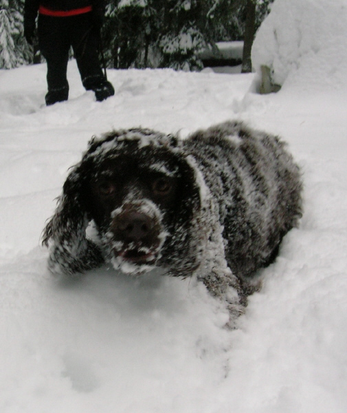 Chien d'eau americain en hivers